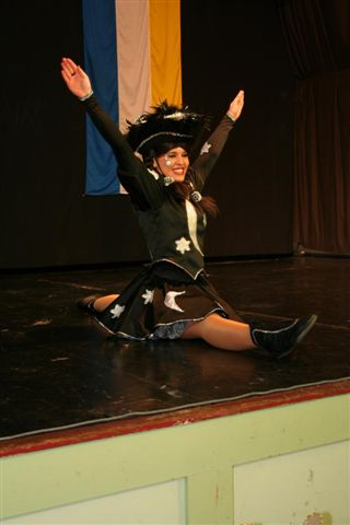 Das Bild stellt das aktuelle Tanzmariechen der KVG Grünberg bei einem Turnier dar.